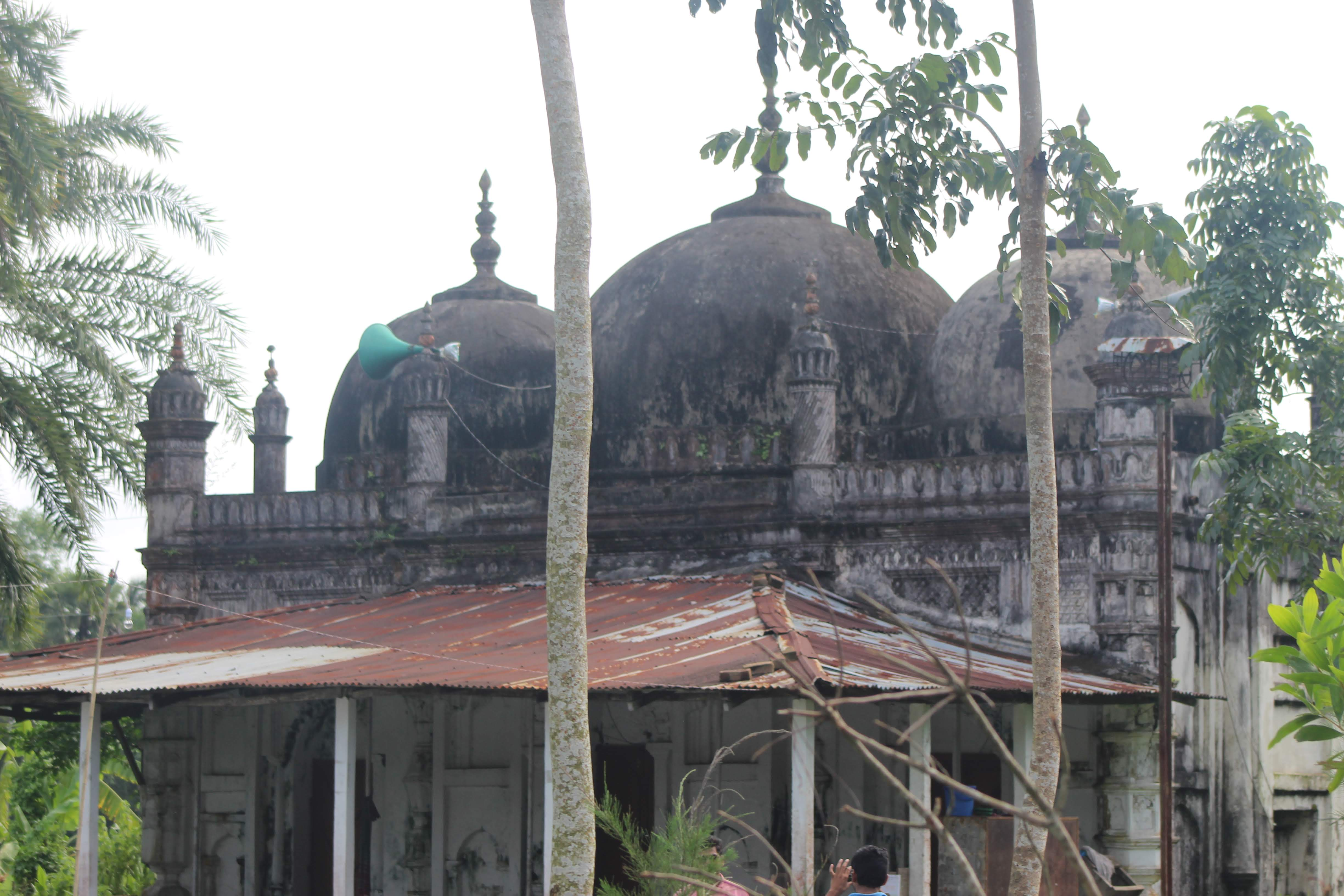 রমজান মিয়া জামে মসজিদ এর উপরের অংশ।